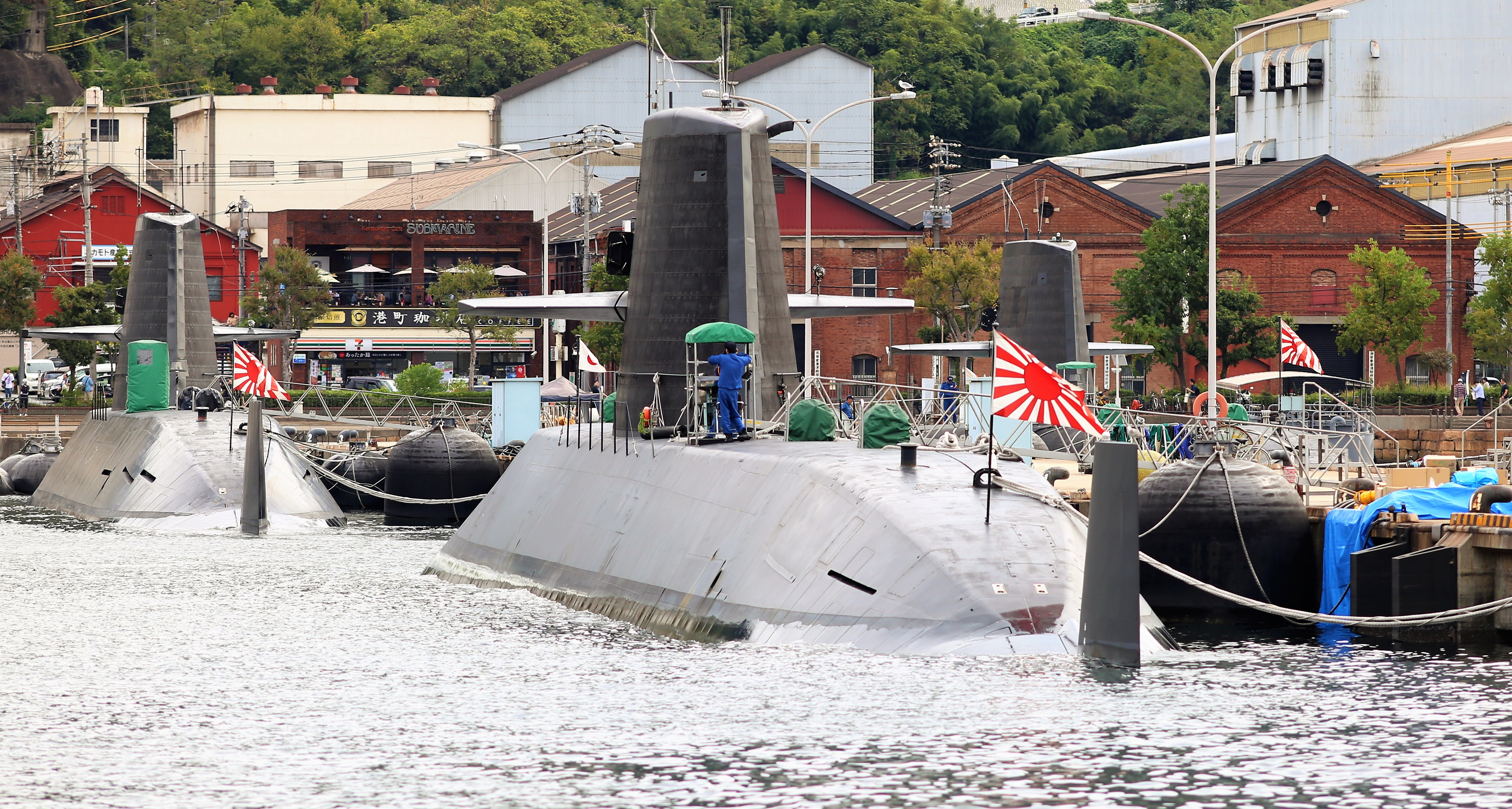 海上から見た「アレイからすこじま」と赤レンガ倉庫群と、海上自衛隊呉基地に停泊する「おやしお」型潜水艦。